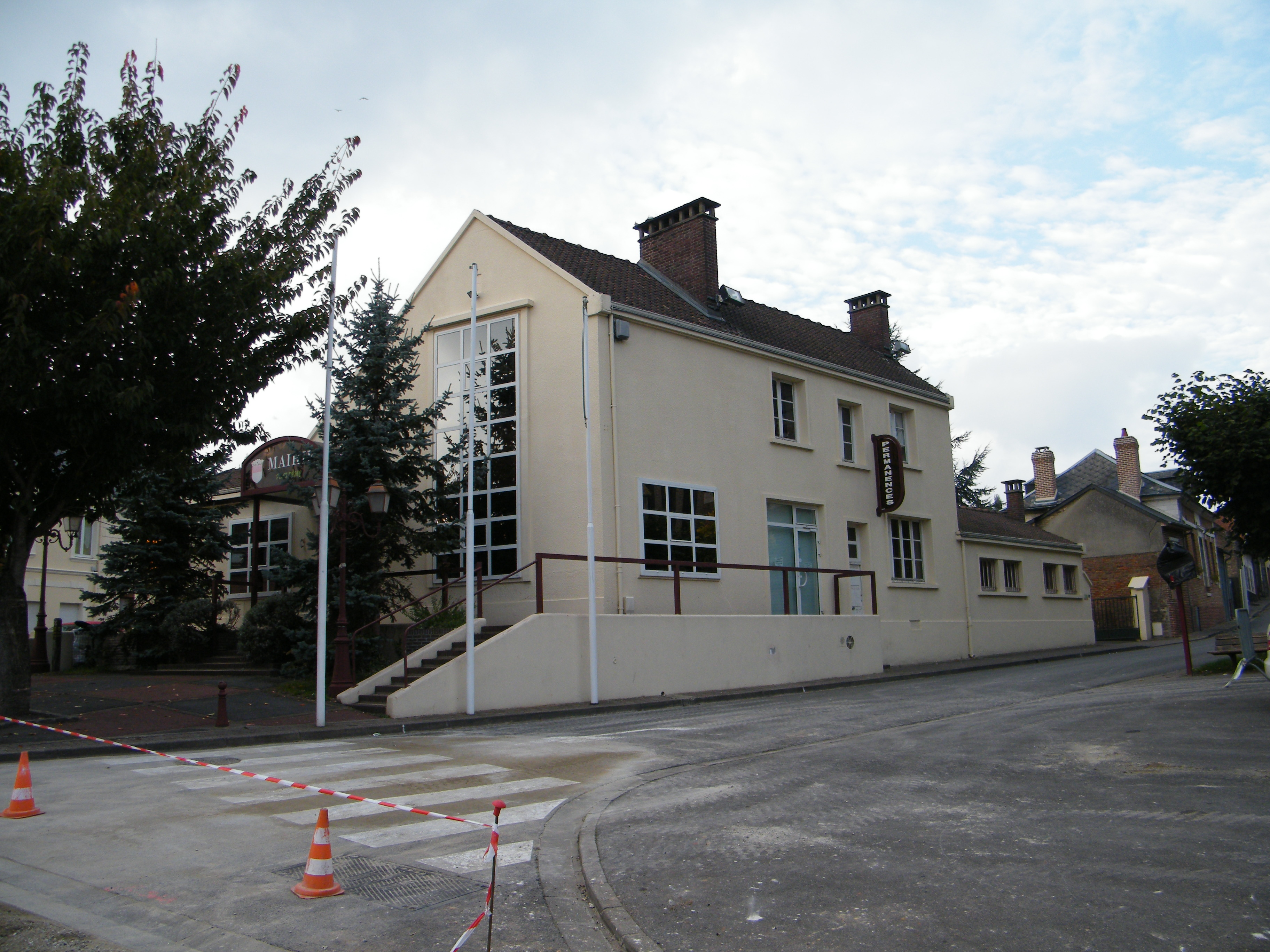 Pont-Rémy, Somme, Fr, Mairie